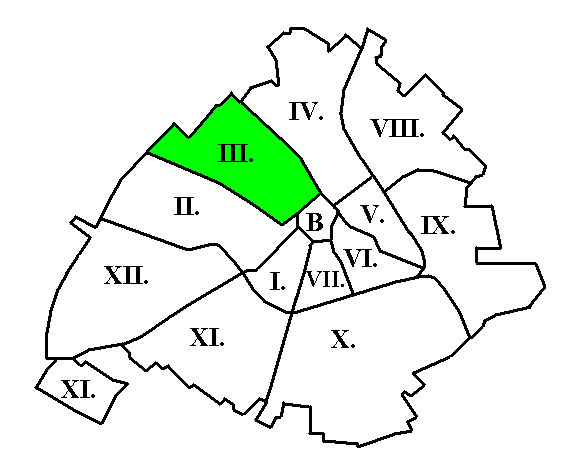 Kecskemét III. kerületének elhelyezkedése